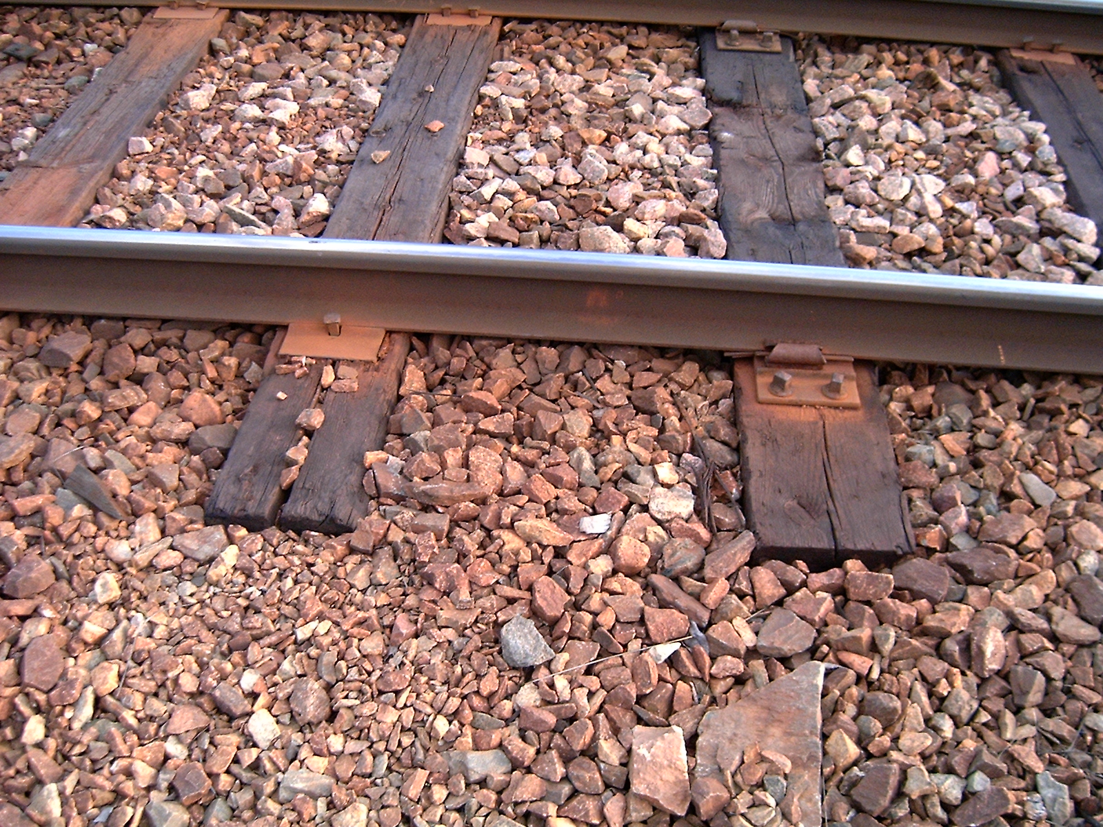 Träsliper med heybackfästning och rälspiksfästning.